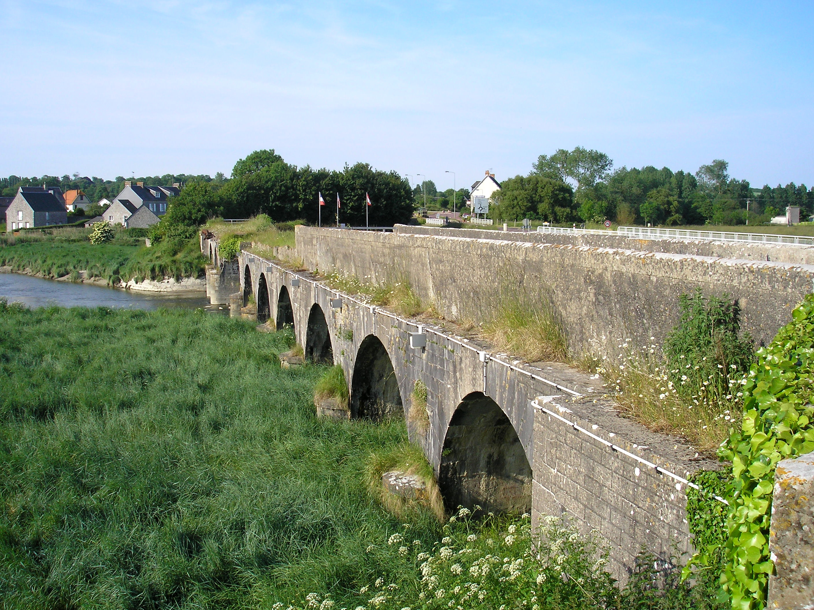 Le pont de la Roque, entre Montchaton, au premier plan, et Heugueville-sur-Sienne, à l'arrière-plan (Normandie, France).